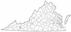 va maps